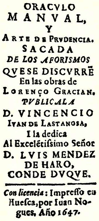 Página del título de Baltasar Gracián, Oráculo manual y arte de prudencia..., Huesca, Juan Nogués, 1647. Descripción analítica: ORACVLO/ MANVAL,/ Y/ ARTE DE PRVDENCIA./ SACADA/ DE LOS AFORISMOS/ QUE SE DISCVRREN/ En las obras de/ LORENÇO GRACIAN./ PVBLICALA/ D. VICENCIO/ IVAN DE LASTANOSA,/ I la dedica/ Al Excelentissimo Señor:/ D. LVIS MENDEZ/ DE HARO,/ CONDE DVQUE.// Con licencia: Impresso en/ Huesca, por Iuan No-/gues. Año 1647. Hojas en 24º, 209 ff. + 210r; 210vº con fe de erratas.